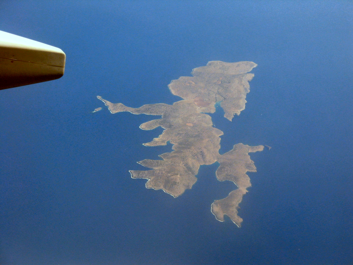 Λέβιθα